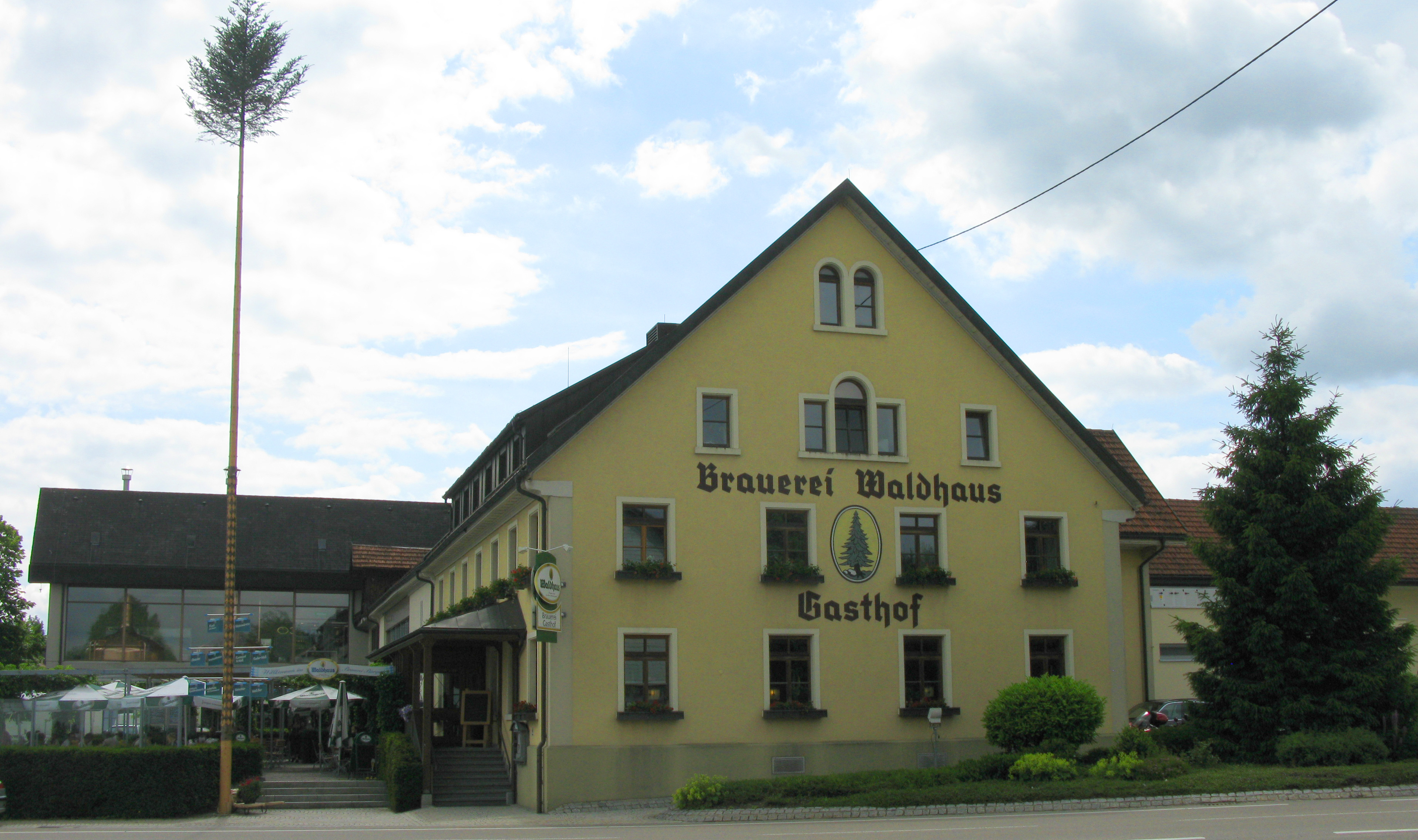 Privatbrauerei Waldhaus in Weilheim-Waldhaus